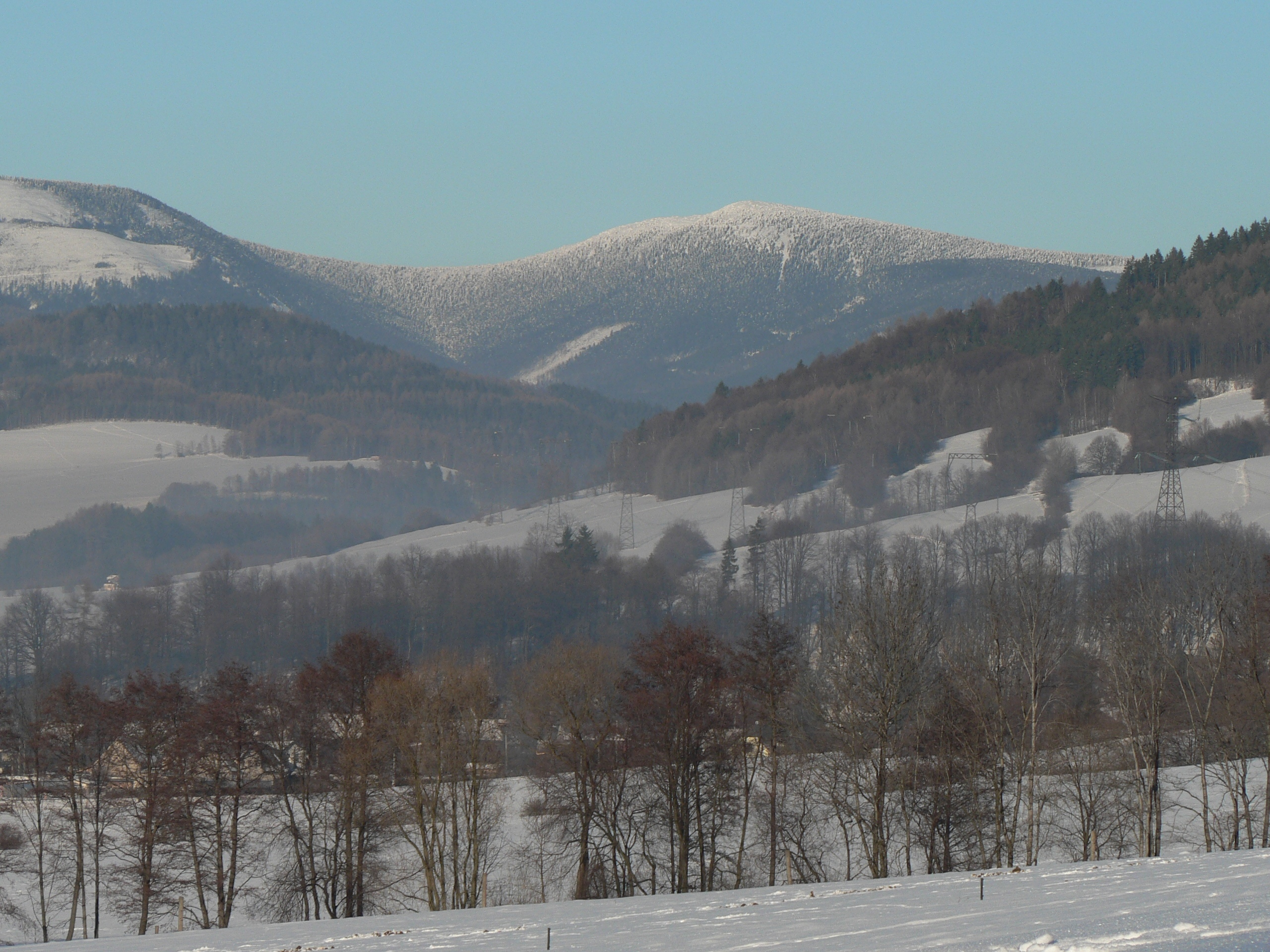 Pohled na Červenou horu od jihu.